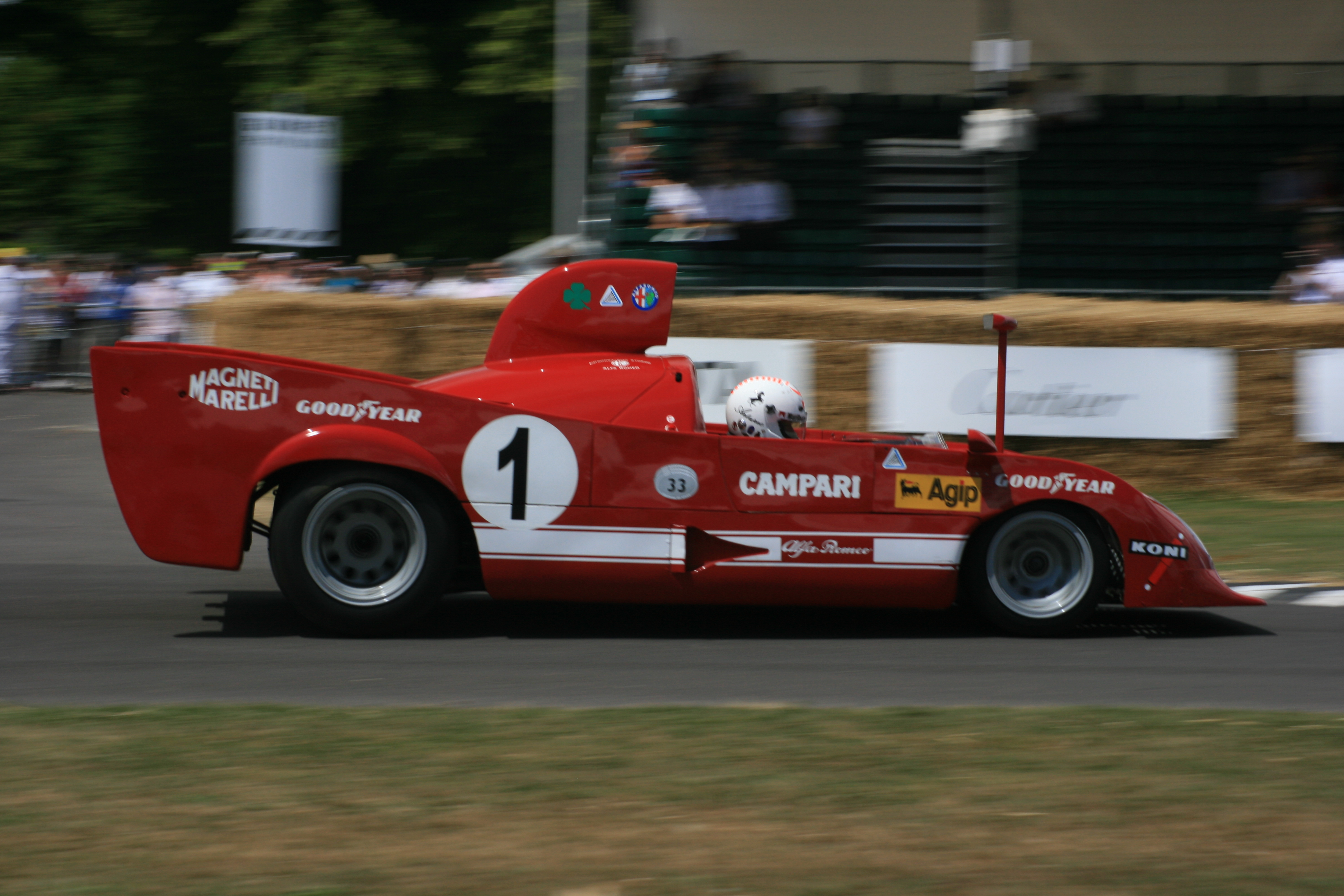 Goodwood 2009 Alfa TT12